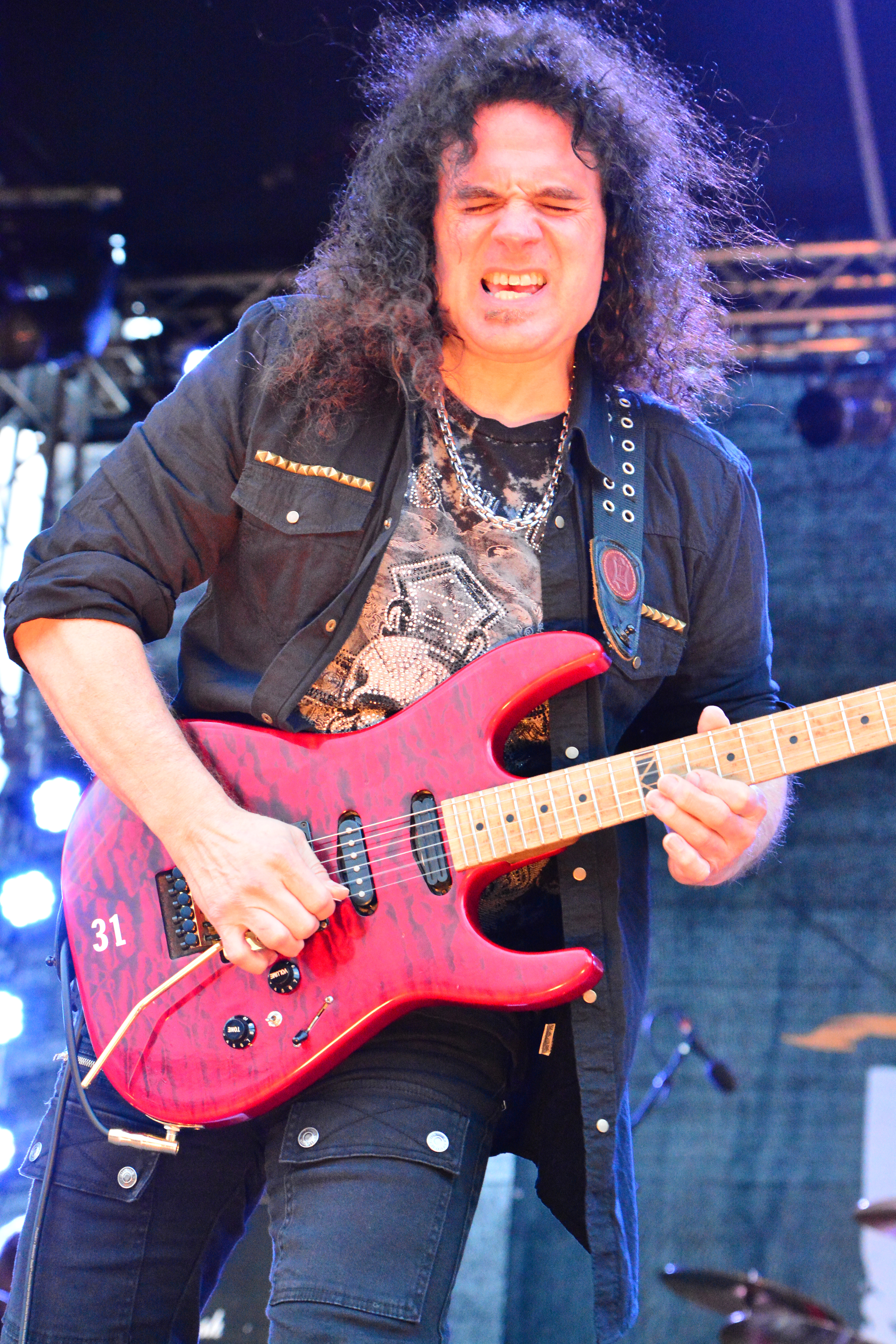 Vinnie Moore von UFO bei den „Hamburg Harley Days“